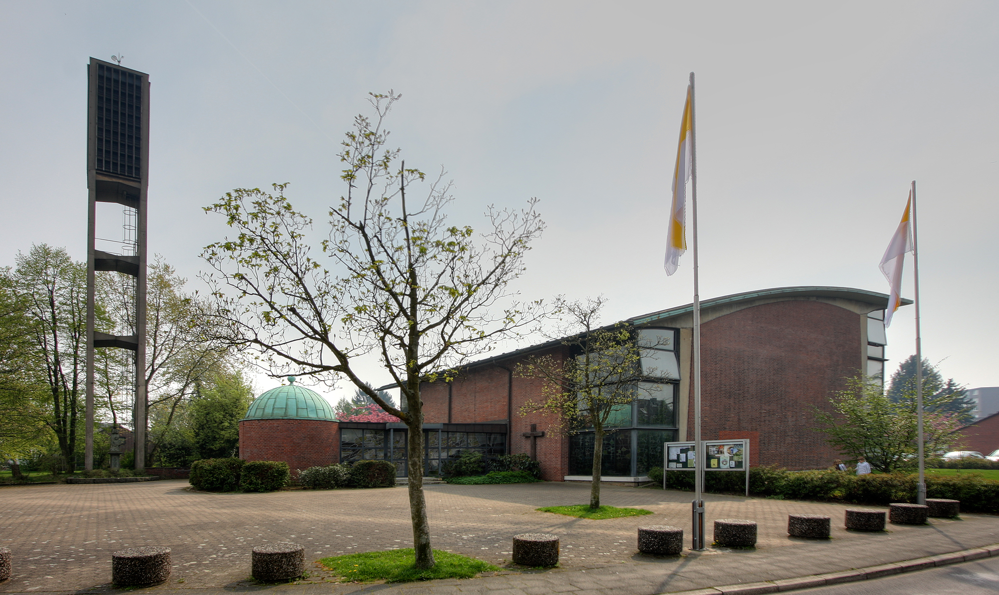 Kirche St. Konrad in Neuss-Gnadental. Blick von Norden. Architekt: Gottfried Böhm